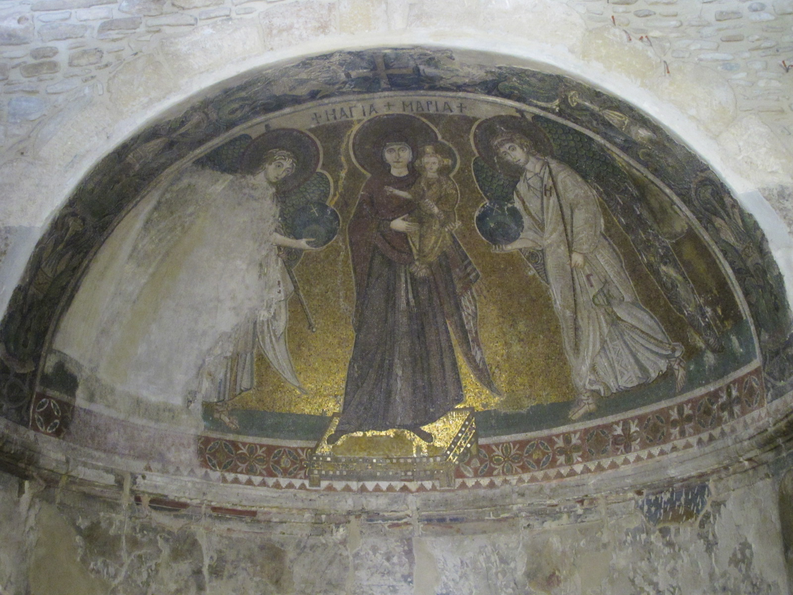 Panagia Angeloktistos, Kiti, Zypern